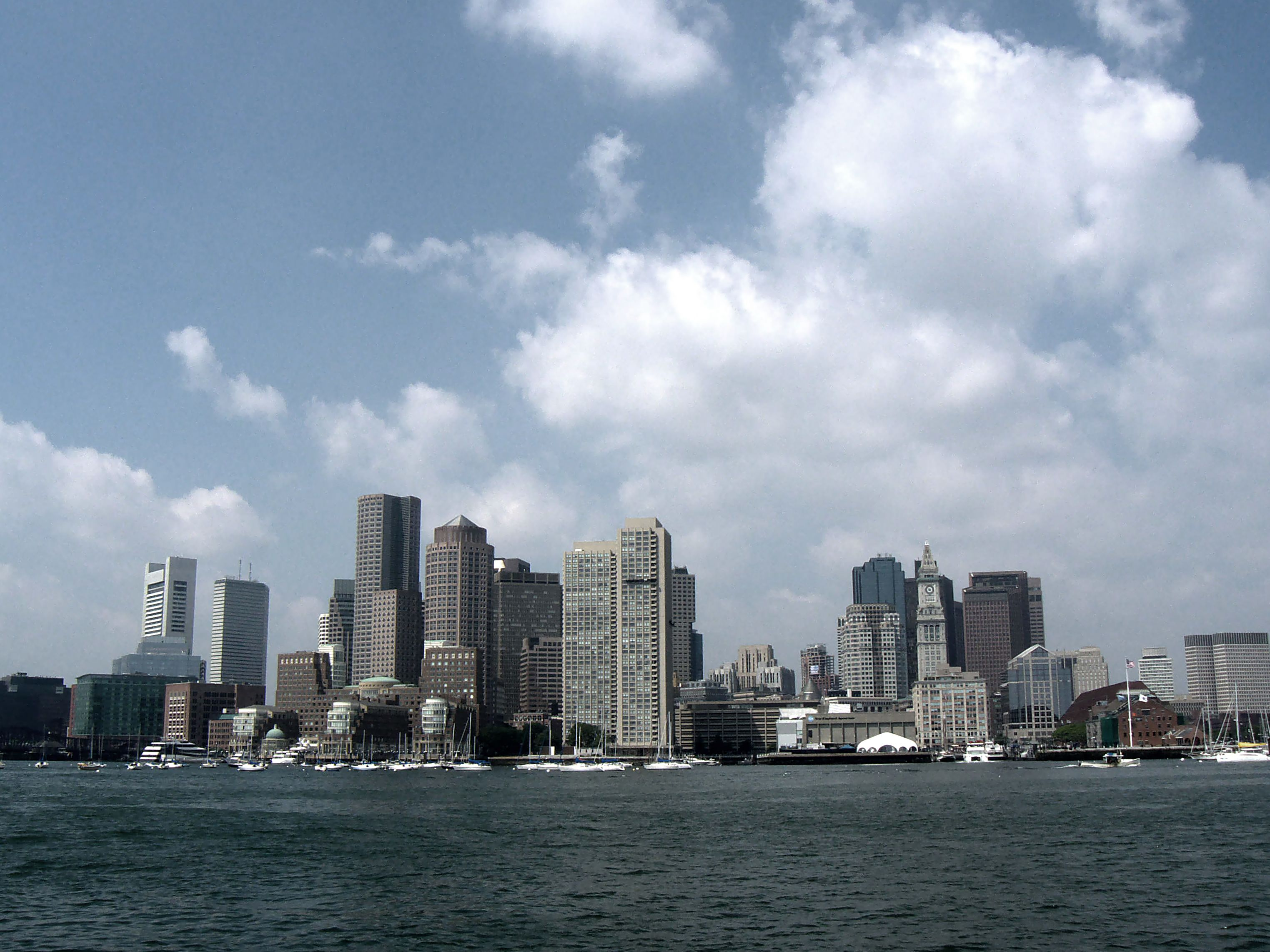 Boston Skyline